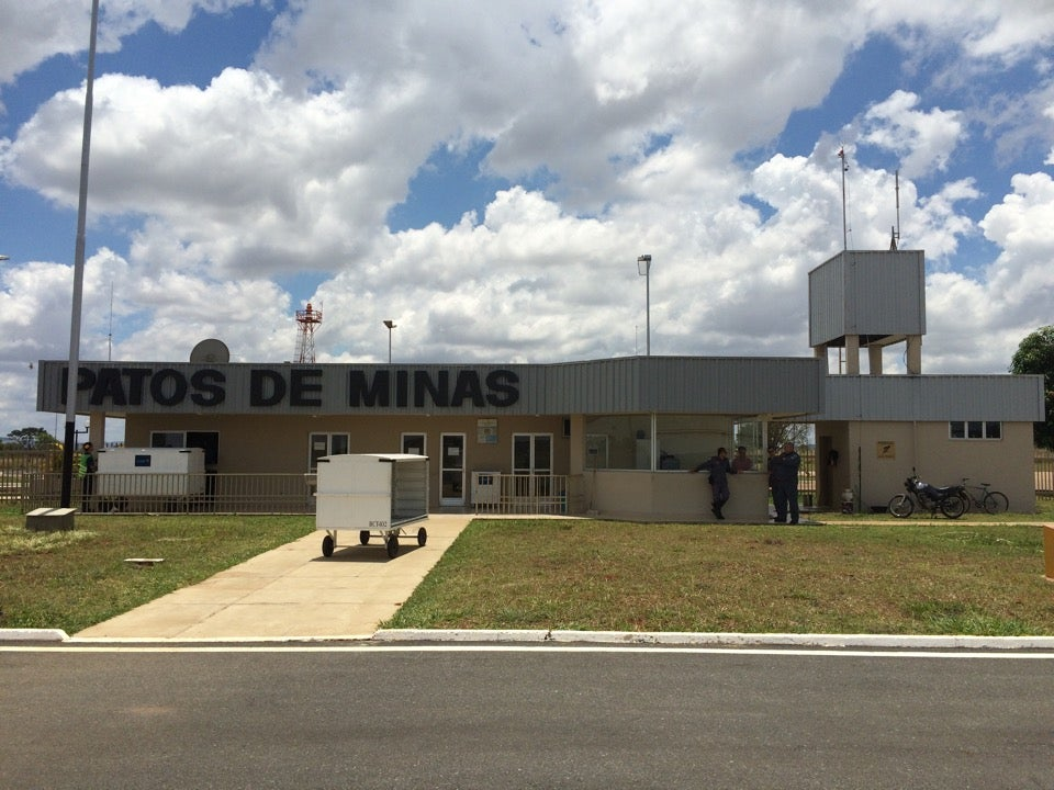 Antigo terminal do aeroporto.